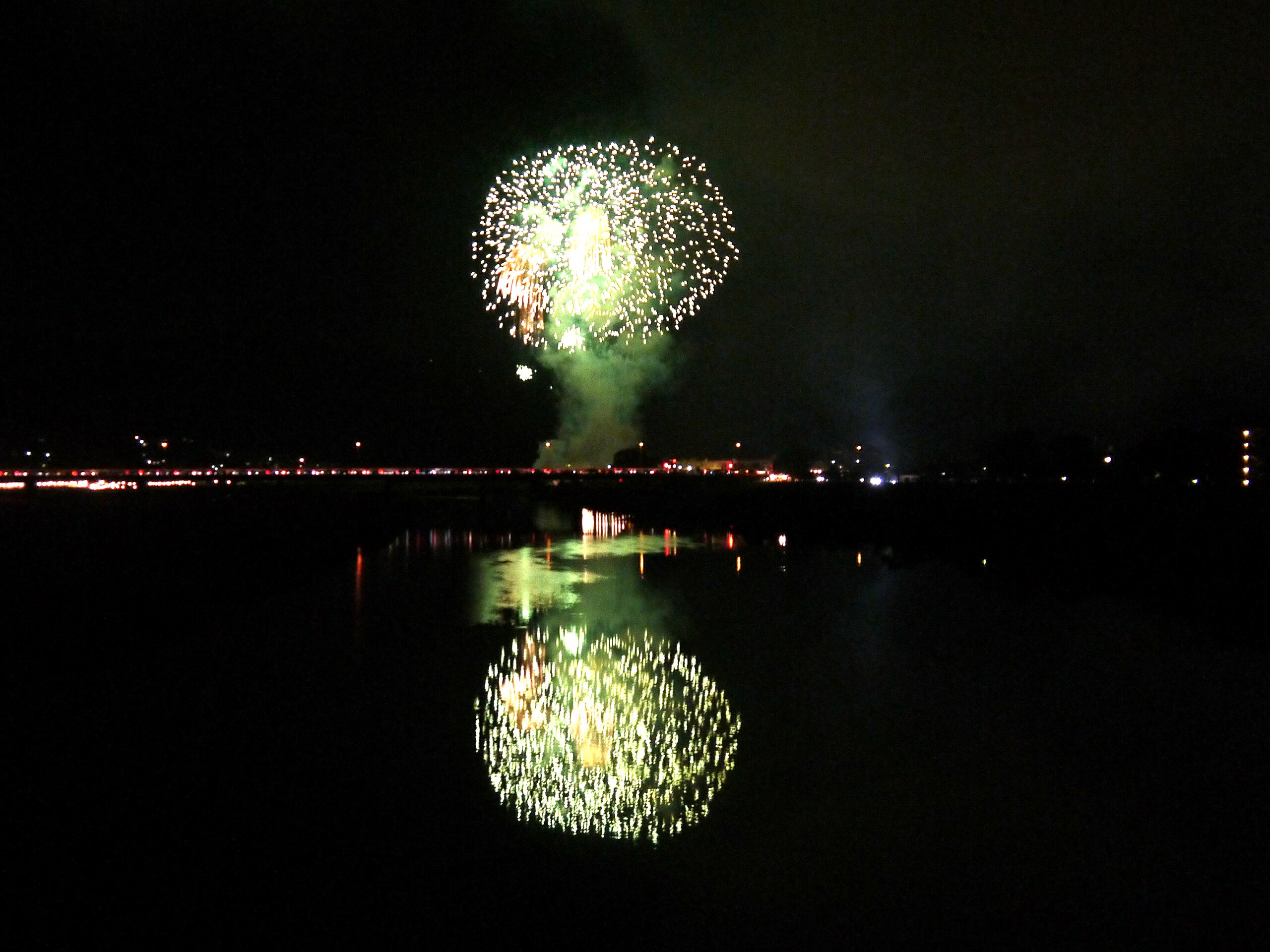 第59回伊勢神宮奉納全国花火大会の様子。2011年7月16日21:15頃に打ち上げ開場の北側にある宮川橋上から撮影。大会最後に打ち上げられたワイドスターマイン。